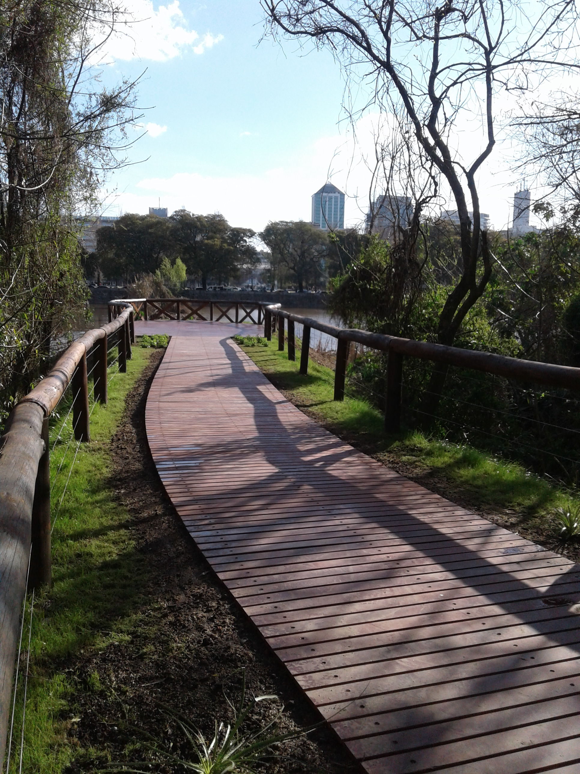 Vista a la ciudad desde la Reserva Ecológica Costanera Sur, CABA, Argentina. La reserva ecológica está ubicada a metros de la zona del centro de la ciudad. Pese a múltiples incendios intencionales e intentos de privatización, la comunidad y organizaciones ambientalistas han conseguido mantenerla en pie.